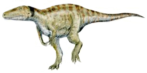 Aerosteon, pencil drawing, digital coloring